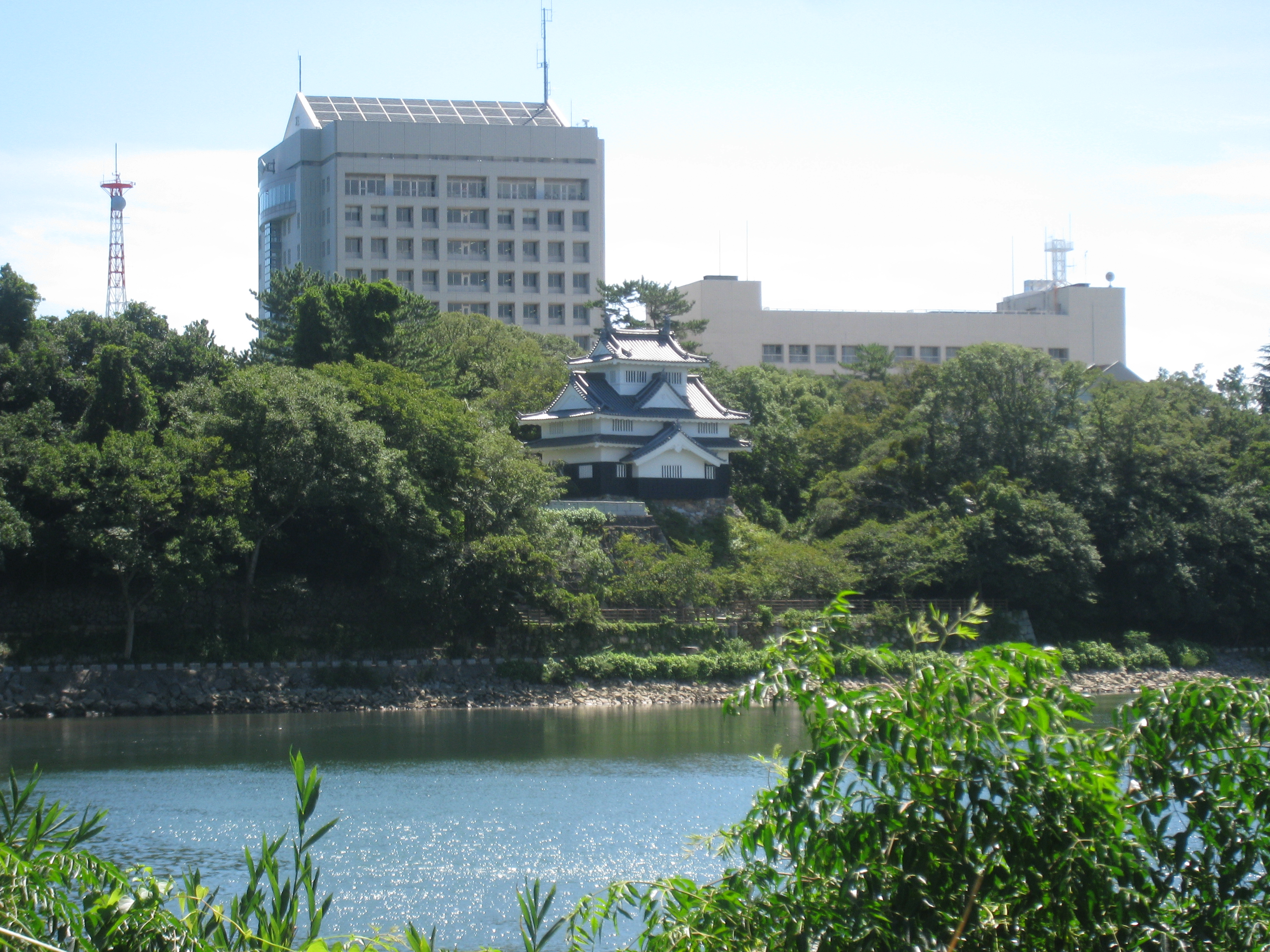 聳える市役所と吉田城